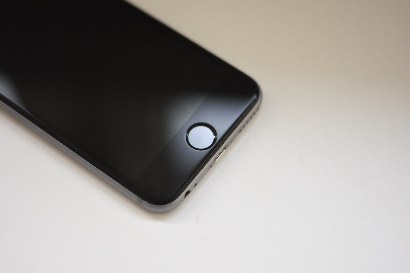 Homebutton mit TouchID eines iPhone 6S